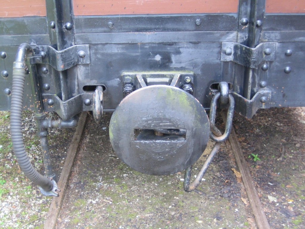 Balancierhebelkupplung bei einem Schmalspurwagen mit innenliegendem Balanciereisen